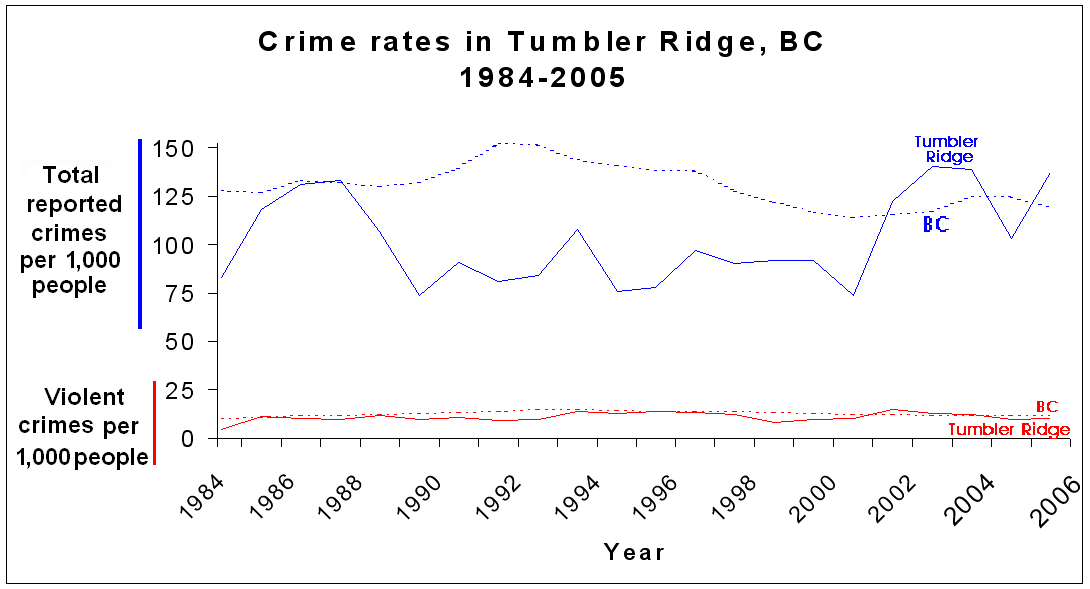 crime trends